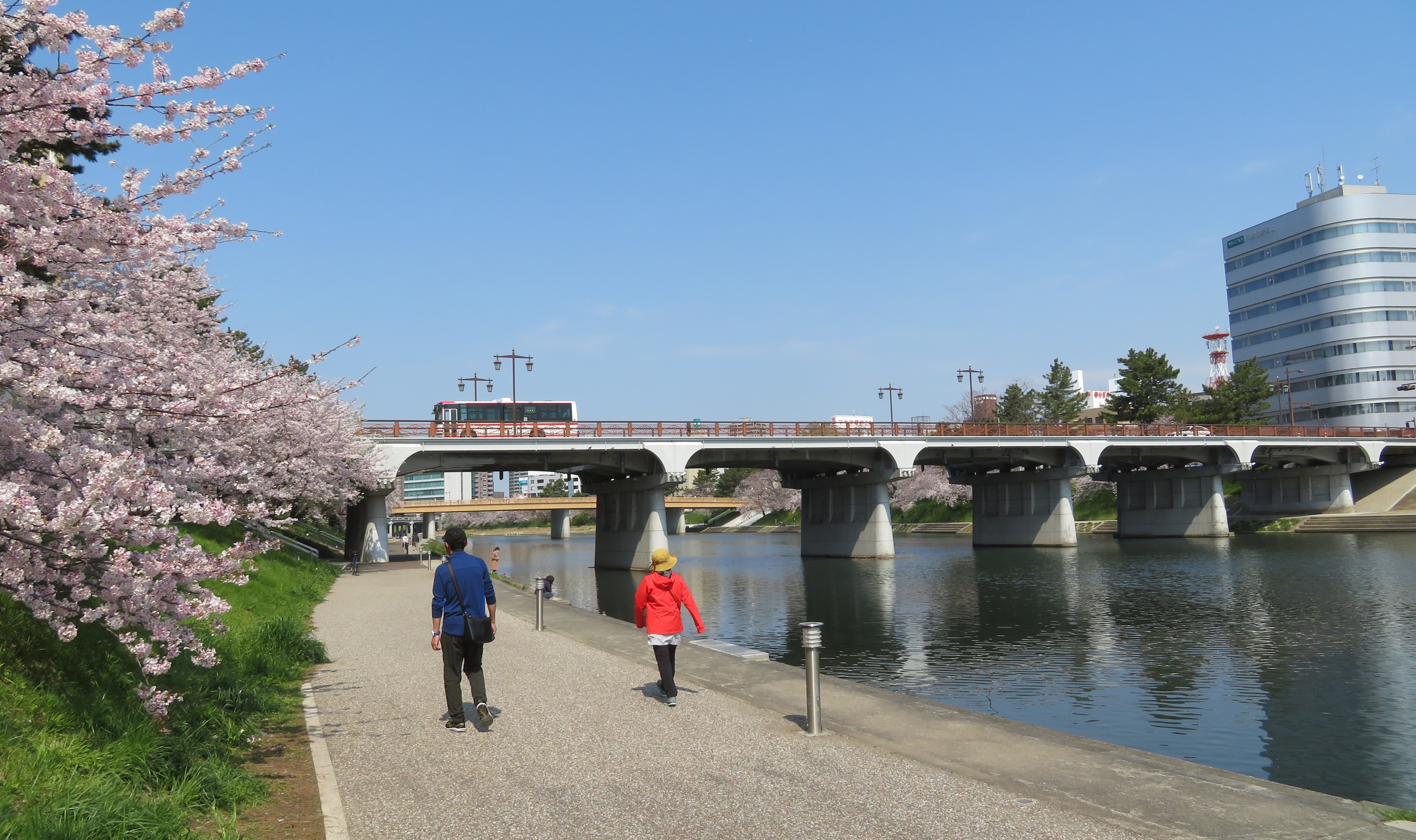 明代橋、乙川（愛知県岡崎市）